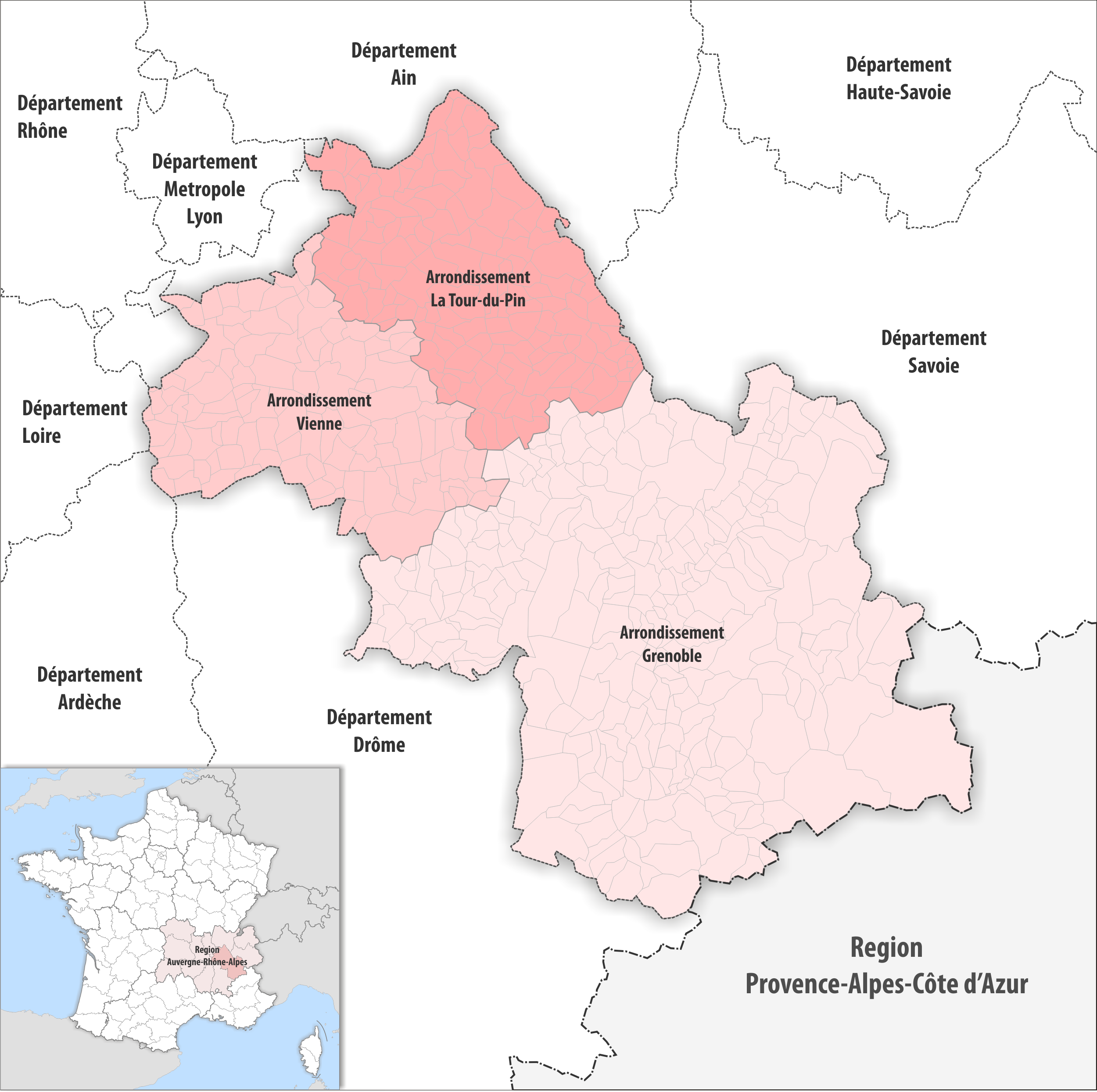 Gemeinden und Arrondissemente im Departement Isère